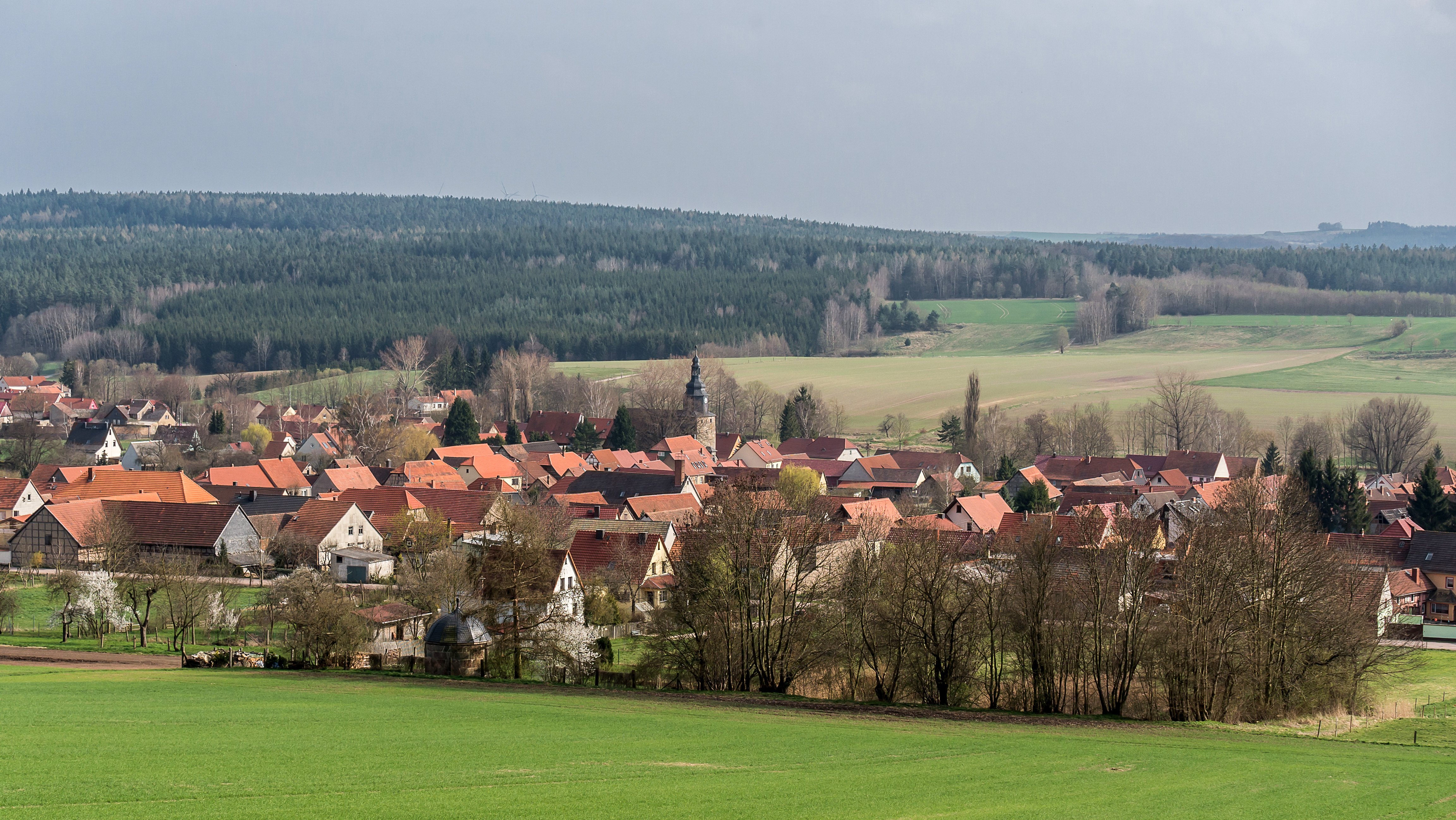 Tonndorf Ortslage